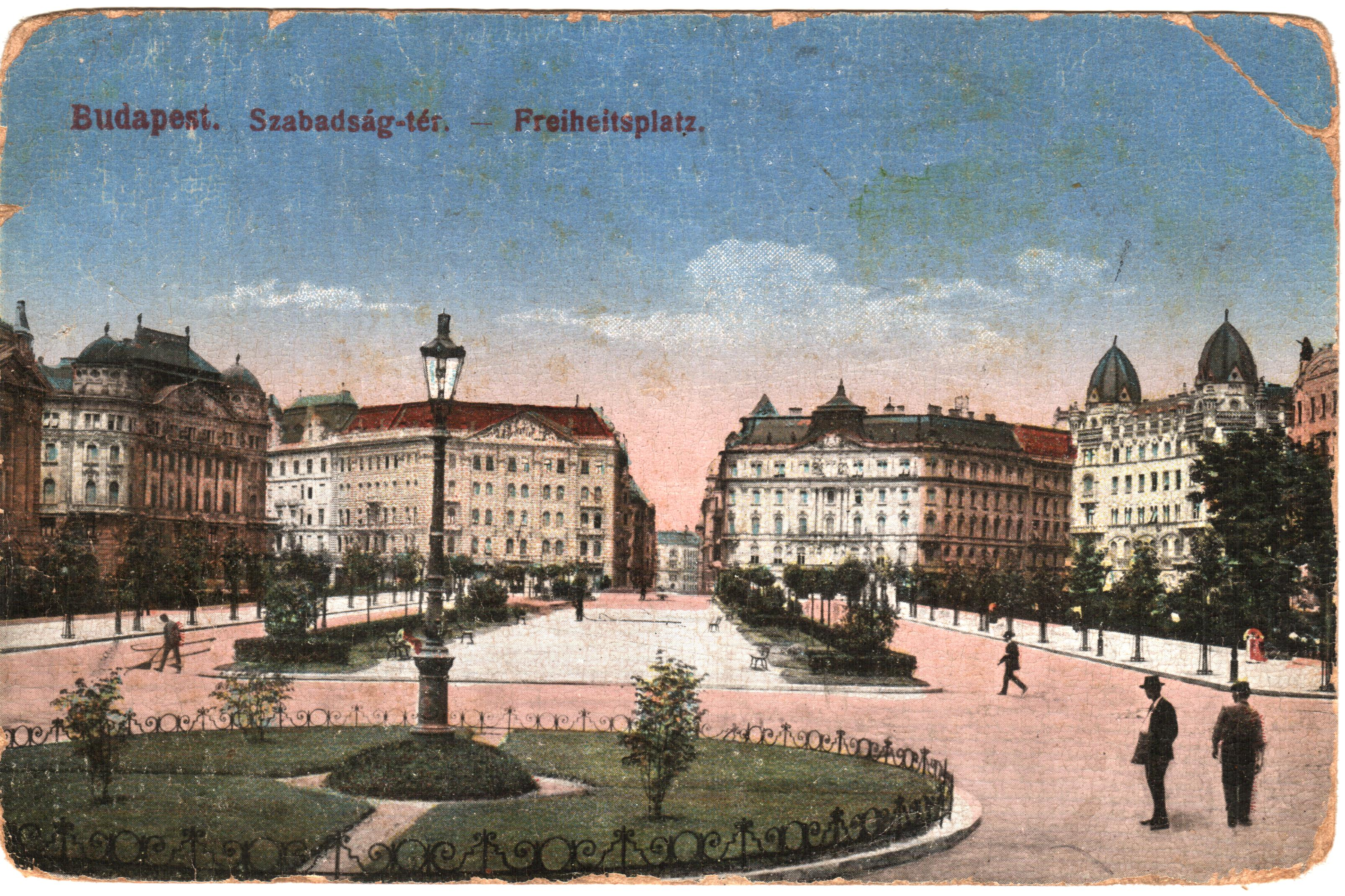 Szabadság-tér, 1916. Budapest. A képeslap hátoldalán postabélyegzés "916....". A képeslap hátoldalával együtt megjelent Creative Commons alatt a Metapolisz DVD sorozatban. Published under Creative Commons in the Metapolisz DVD line. All of the photos and vids in the Metapolisz DVD line are under Creative Commons and can be used even for commercial – for profit – purposes. Recommended Citation Derzsi Elekes Andor: Metapolisz DVD line Megjelent Creative Commons alatt a Metapolisz sorozatban. A Metapolisz sorozat valamennyi képe és filmje Creative Commons alatti valamint kereskedelmi - for profit - célra is felhasználható. Ajánlott hivatkozás: Derzsi Elekes Andor: Metapolisz DVD line